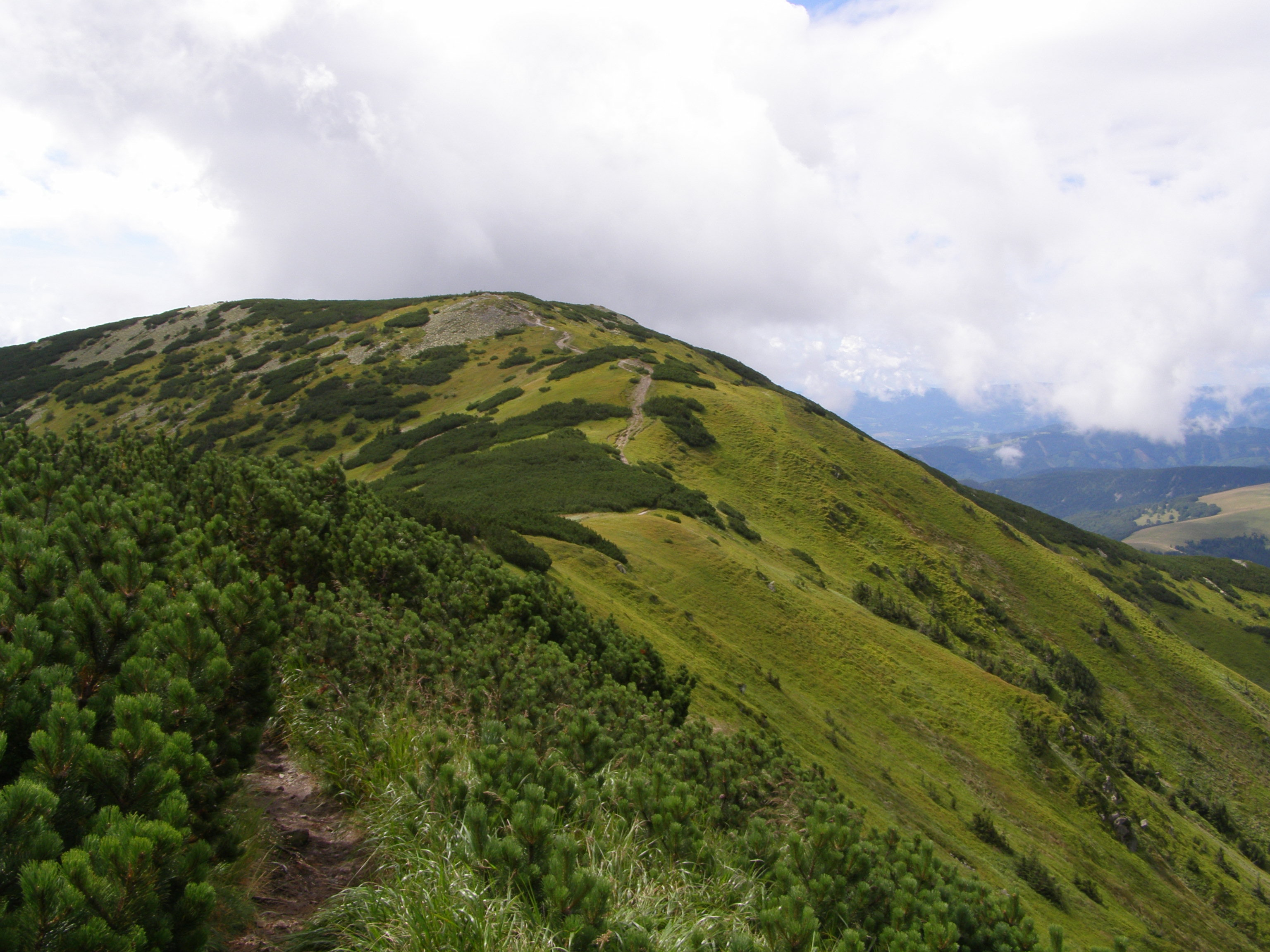 Nízké Tatry, Ďumbierské Tatry, severovýchodní svahy vrcholu Prašivá (1652), pohled ze sedla mezi vrcholy Prašivá a Malá Chochuľa (1720 m)